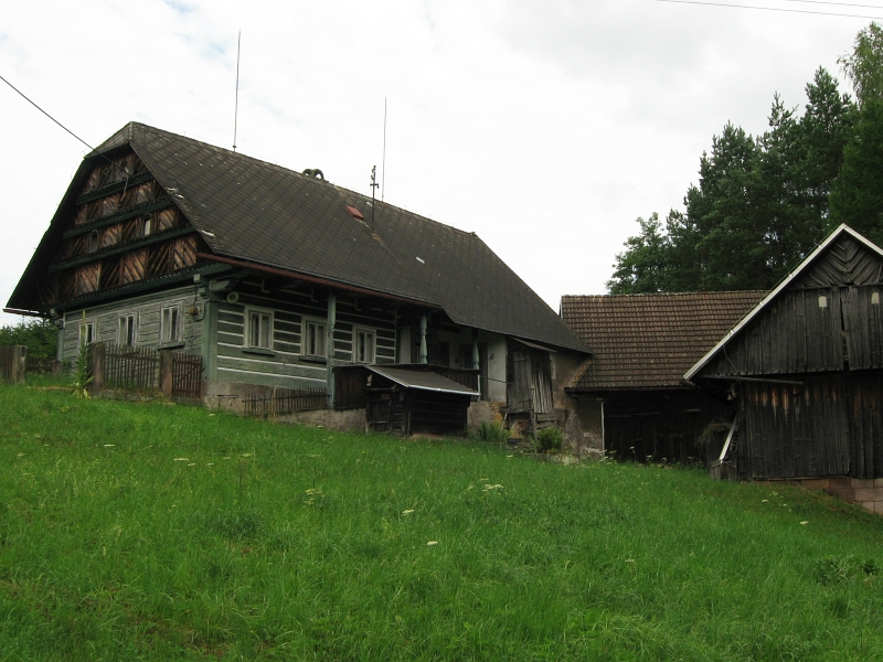 Usedlost čp. 62, Syřenov 62, Syřenov.